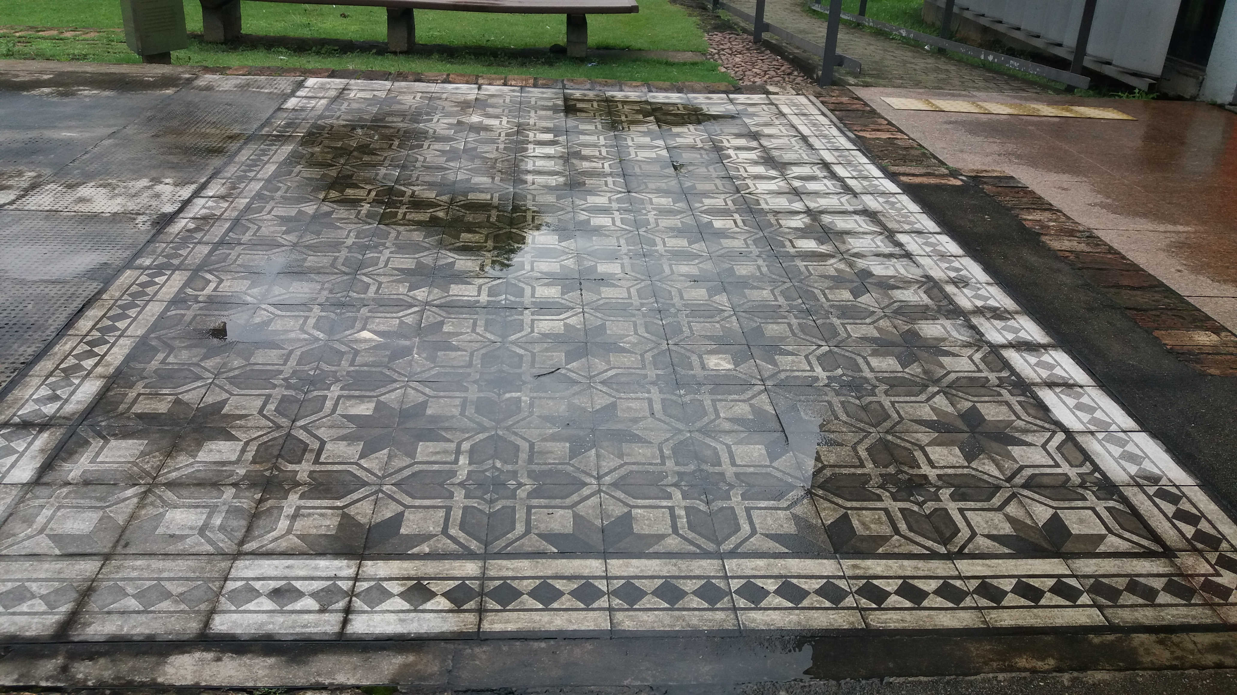 Visão de parte do piso das ruínas tombadas pelo CONPRESP (Conselho Municipal de Preservação do Patrimônio Histórico, Cultural e Ambiental da Cidade de São Paulo) da Capela de São Sebastião do Barro Branco, na esquina entre a Avenida Água Fria e a Avenida Nova Cantareira.